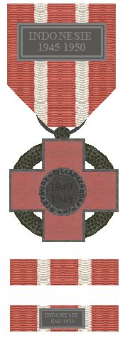 Herinneringskruis Nederlandse Roode Kruis 1940-1945